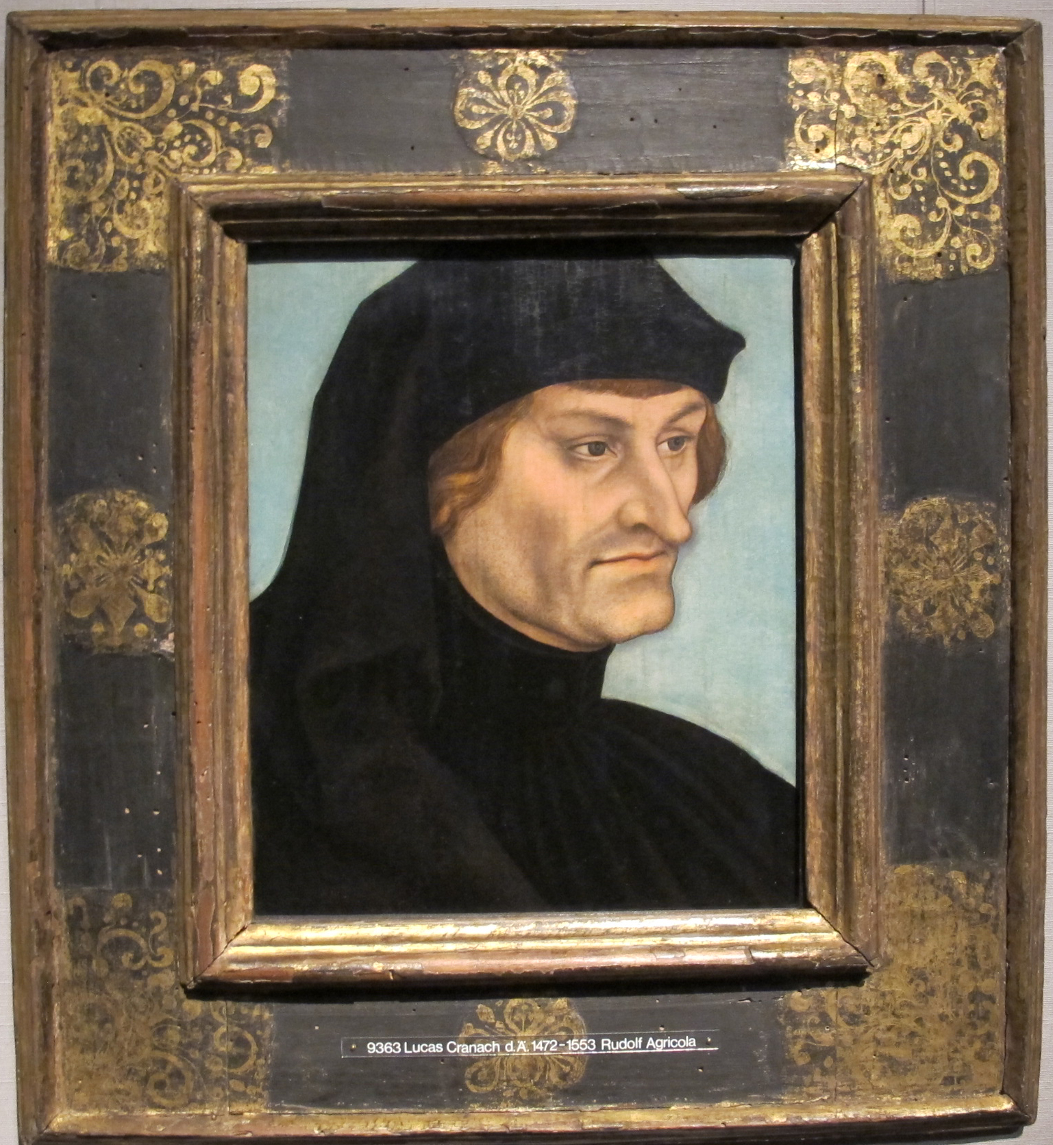 Ritratto di rudolph agricola